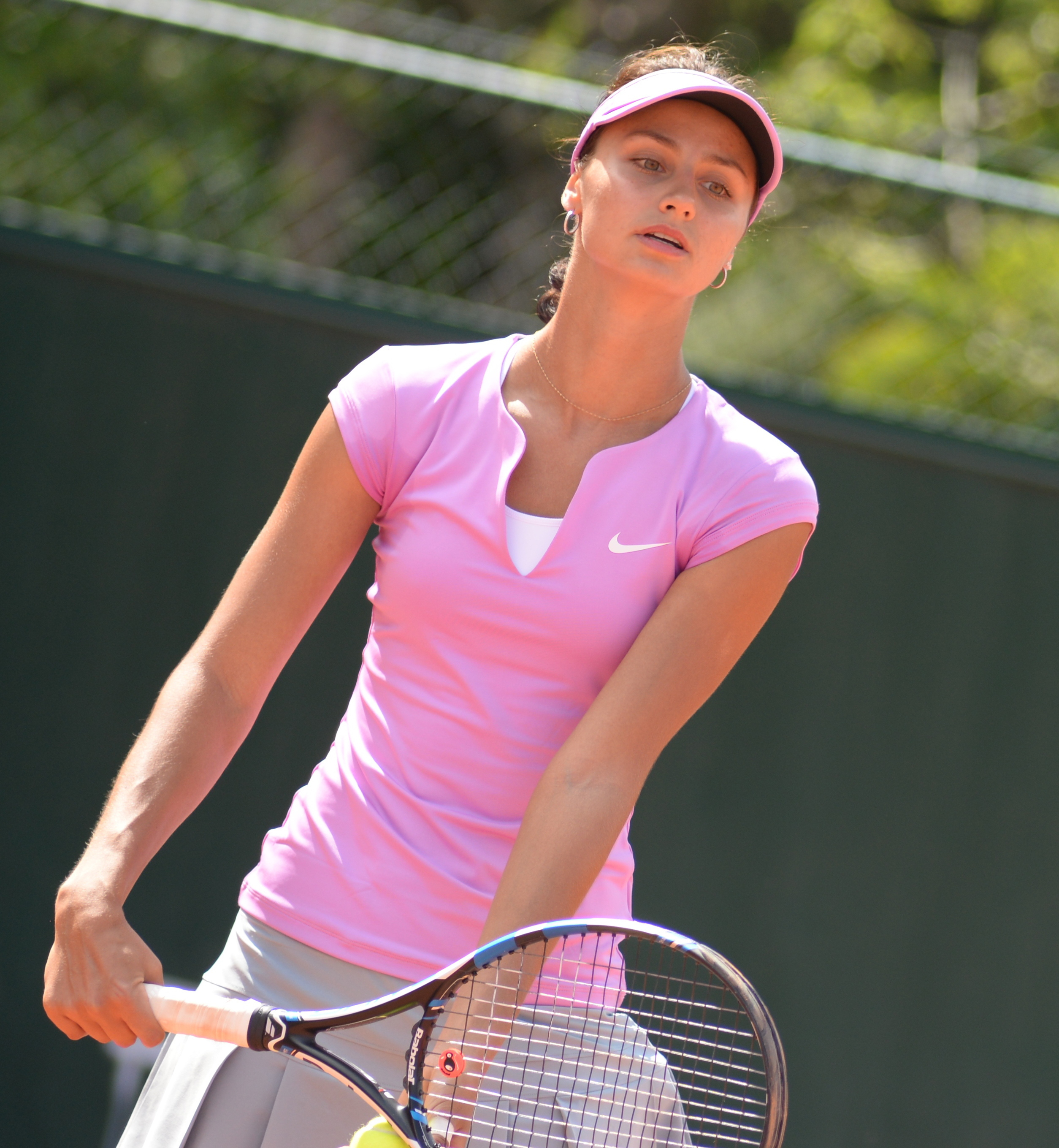 Elizaveta Kulichkova